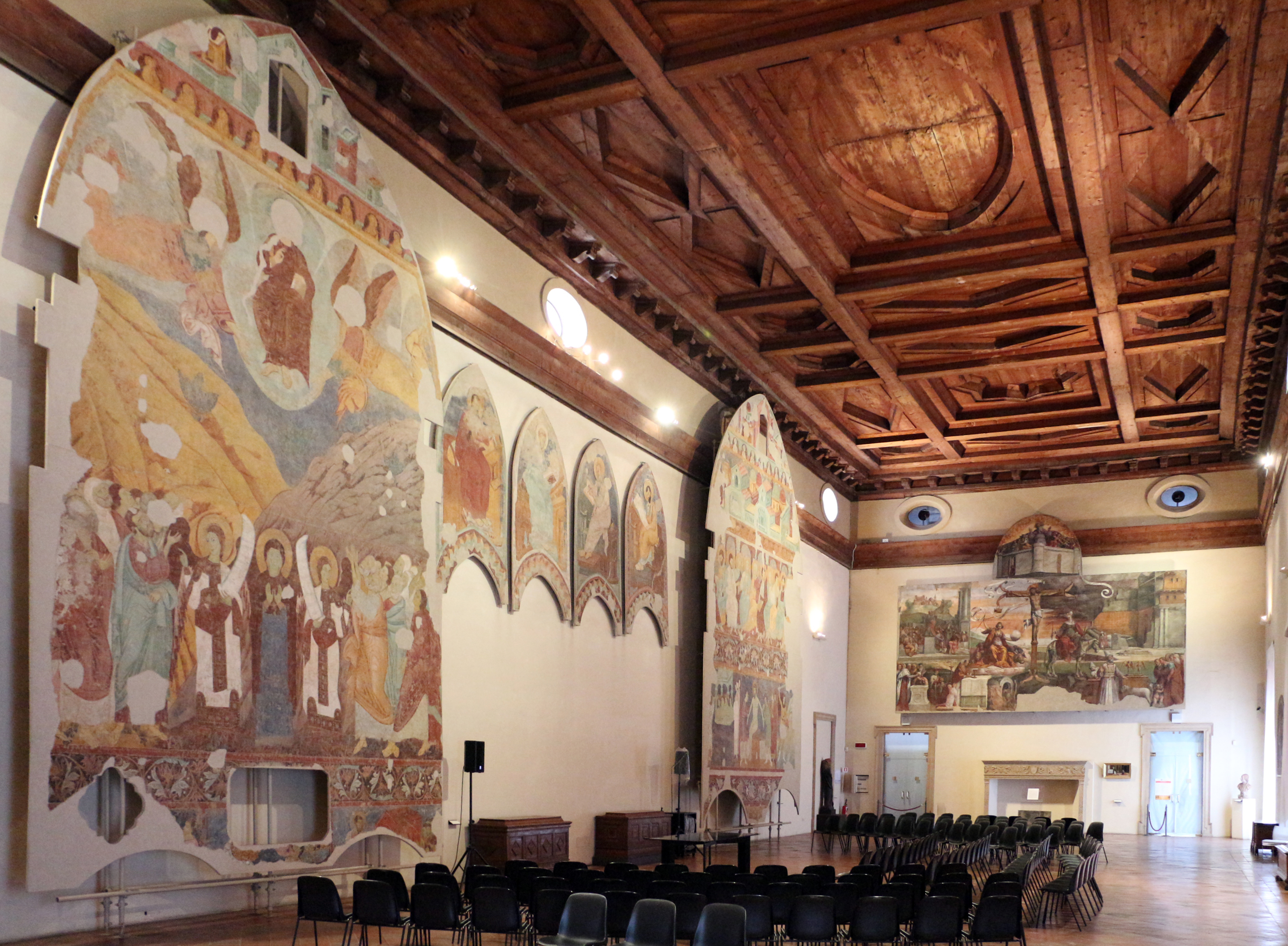 Palazzo dei Diamanti (Ferrara) This is a photo of a monument which is part of cultural heritage of Italy.